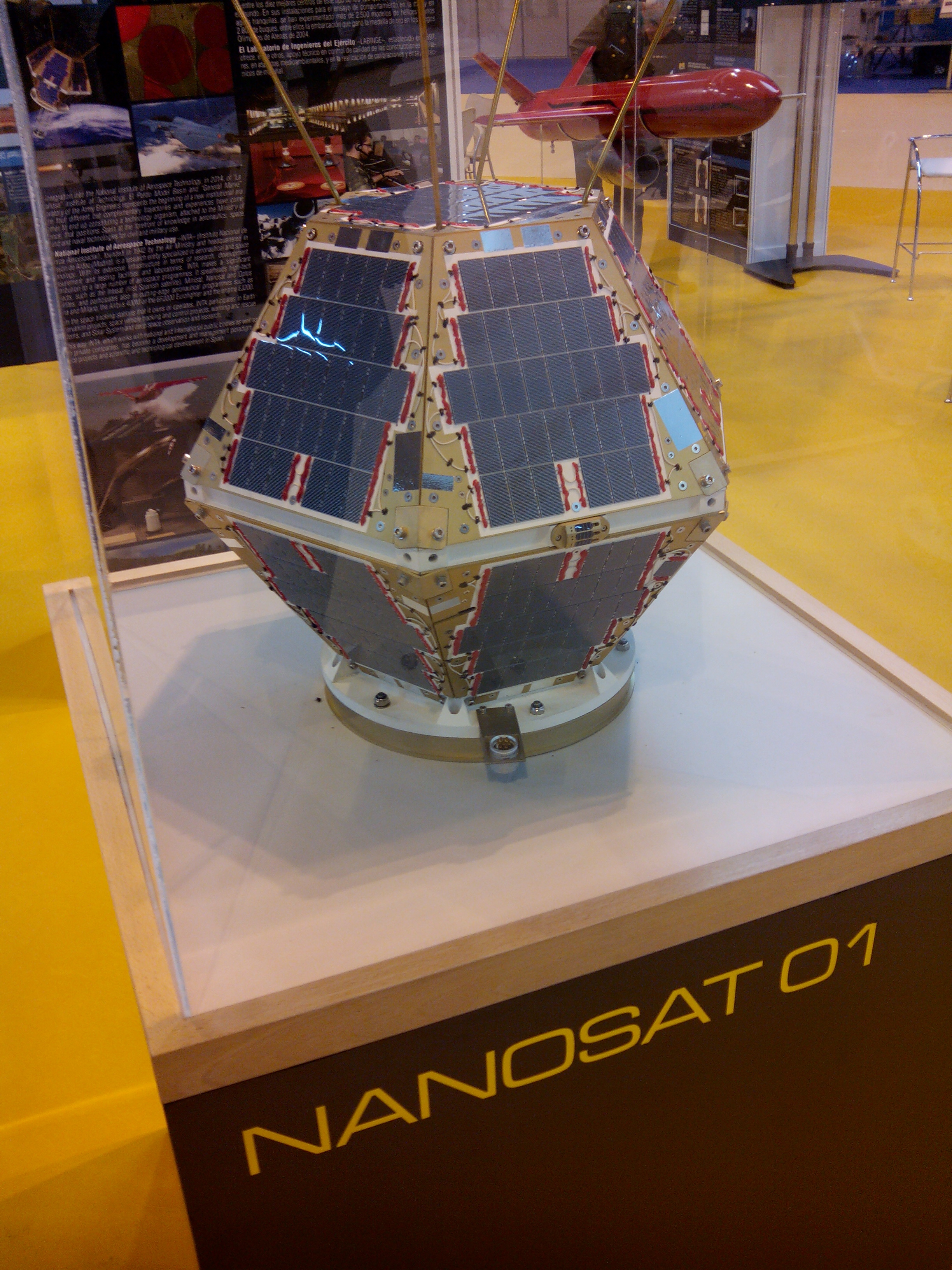 Reproducción del Nanosat 01 desarrollado por el INTA expuesto en el Homsec 2015 de Madrid.